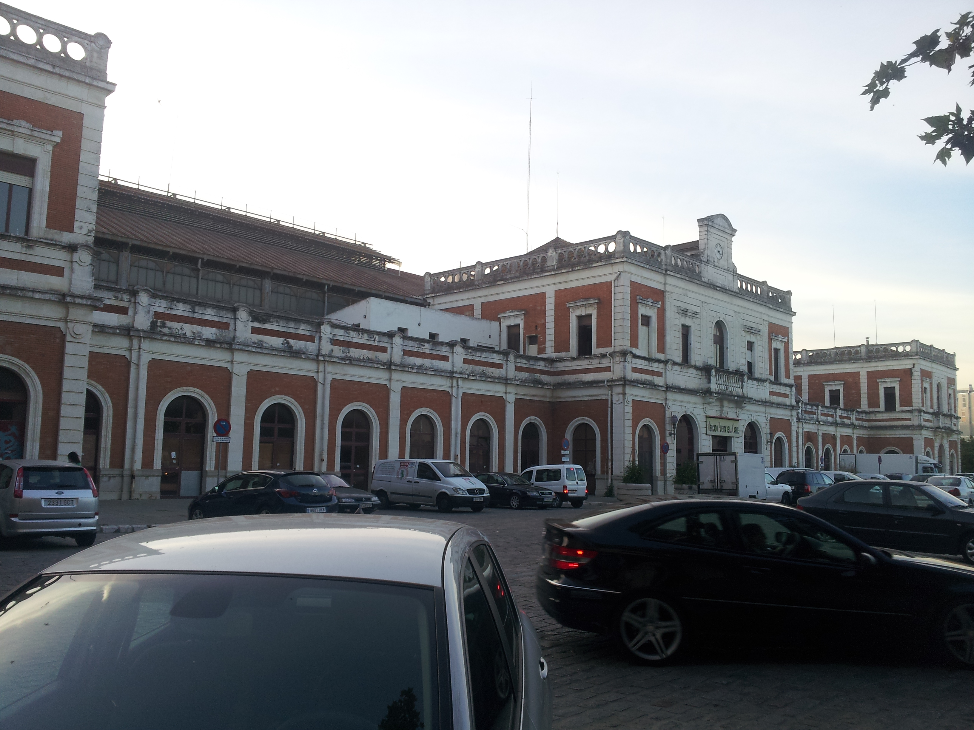 Antigua estación de Ferrocarril de San Bernardo, conocida popularmente como Estación de Cádiz